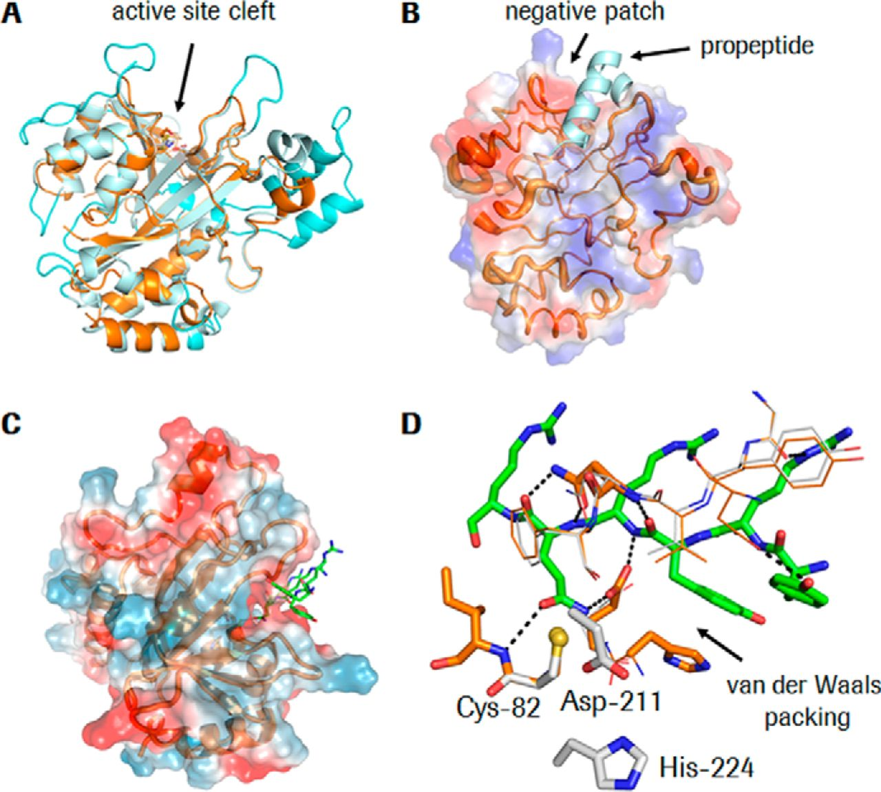 Imatges de la transglutaminasa microbiana.